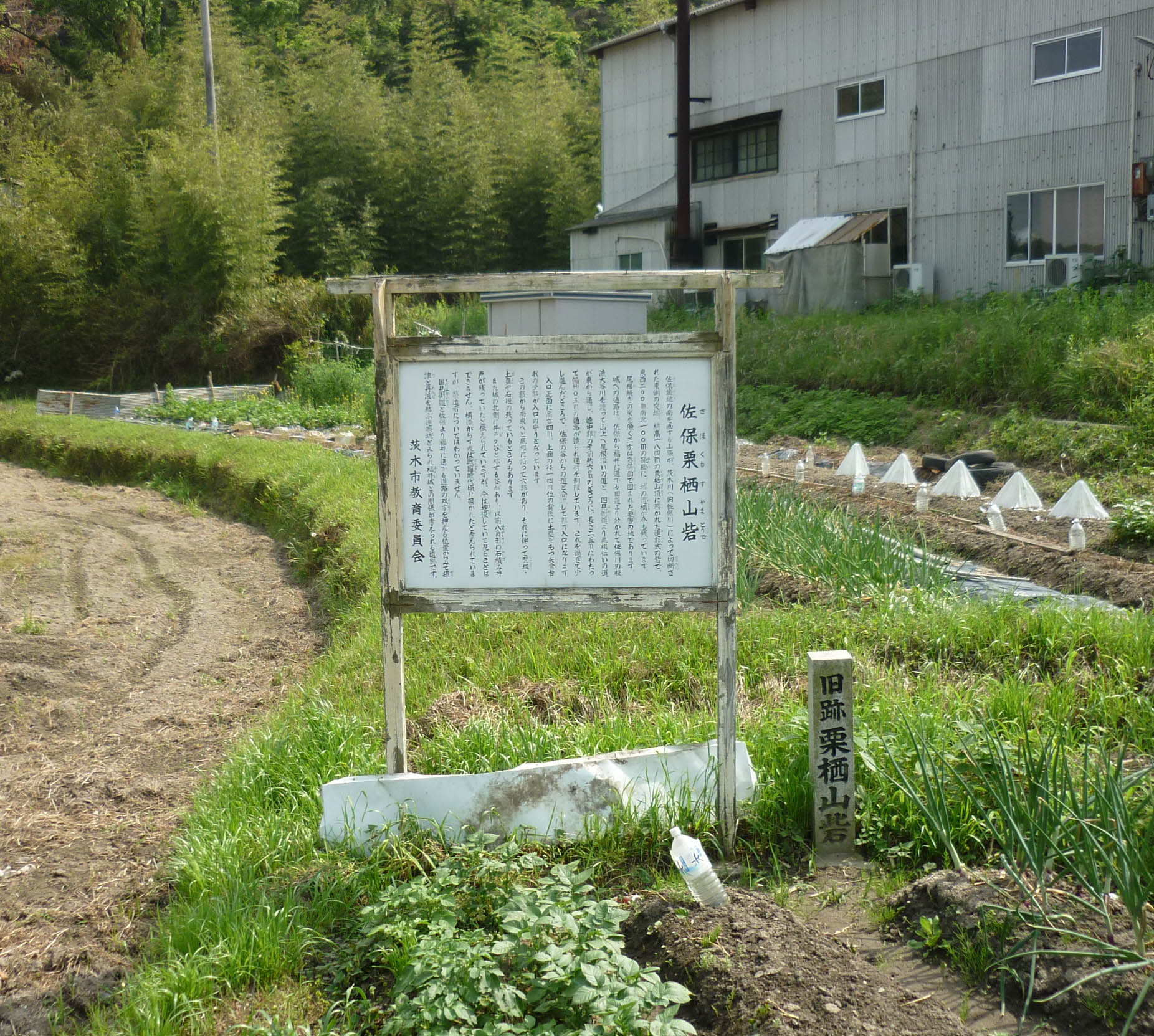 佐保来栖山砦の案内看板